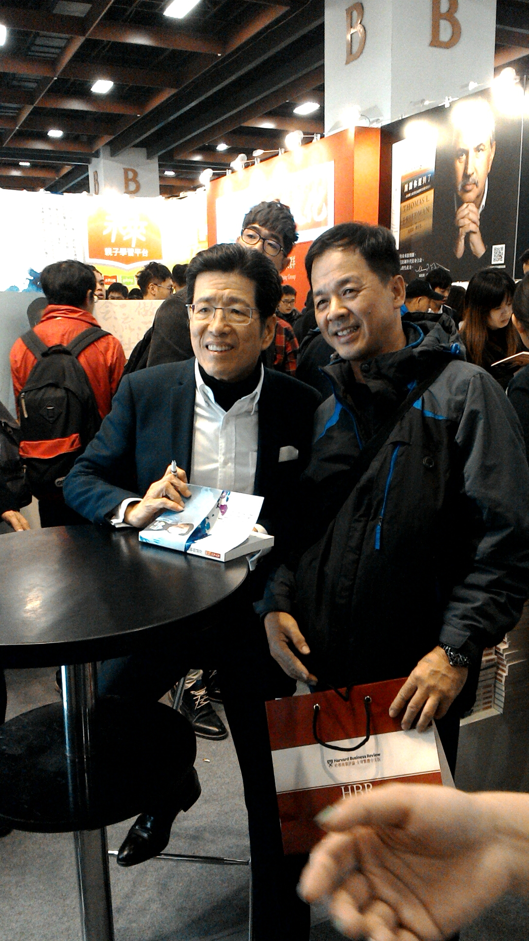 2017年台北國際書展，嚴長壽簽書會。